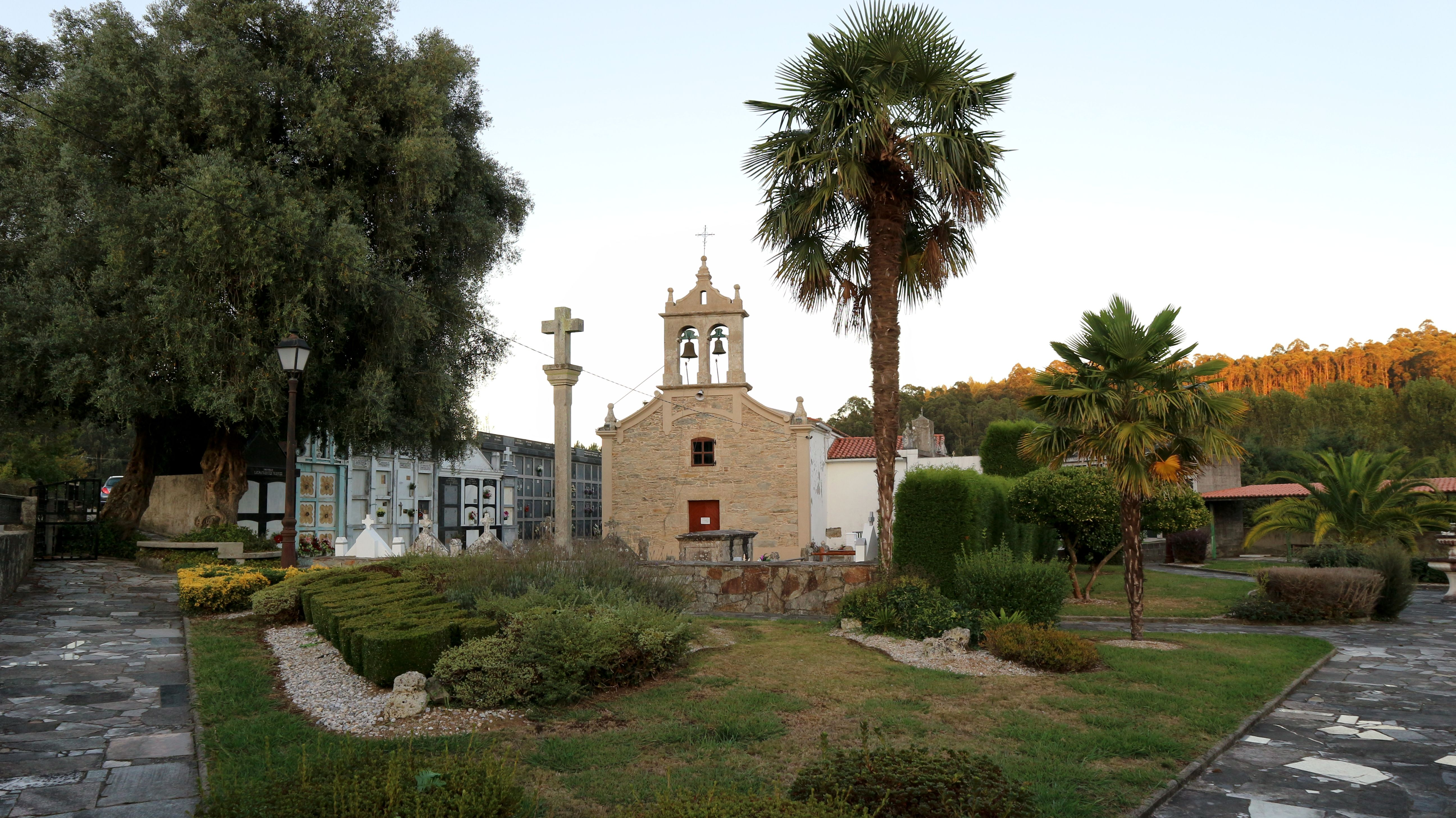 Igrexa de San Xián de Cabanas. En Cabanas, Abegondo.